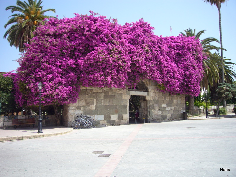 Kos town